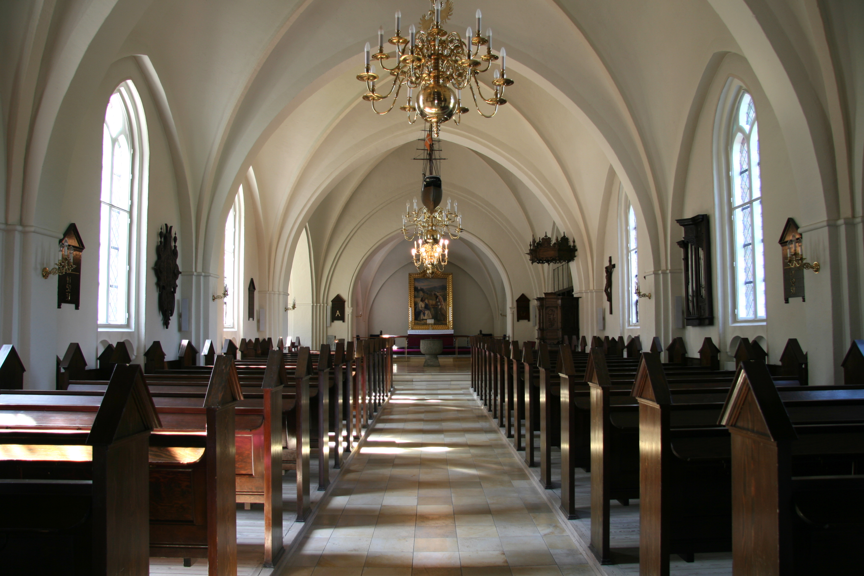 Kildevældskirken in Copenhagen, Denmark. Interior seen from entrance.